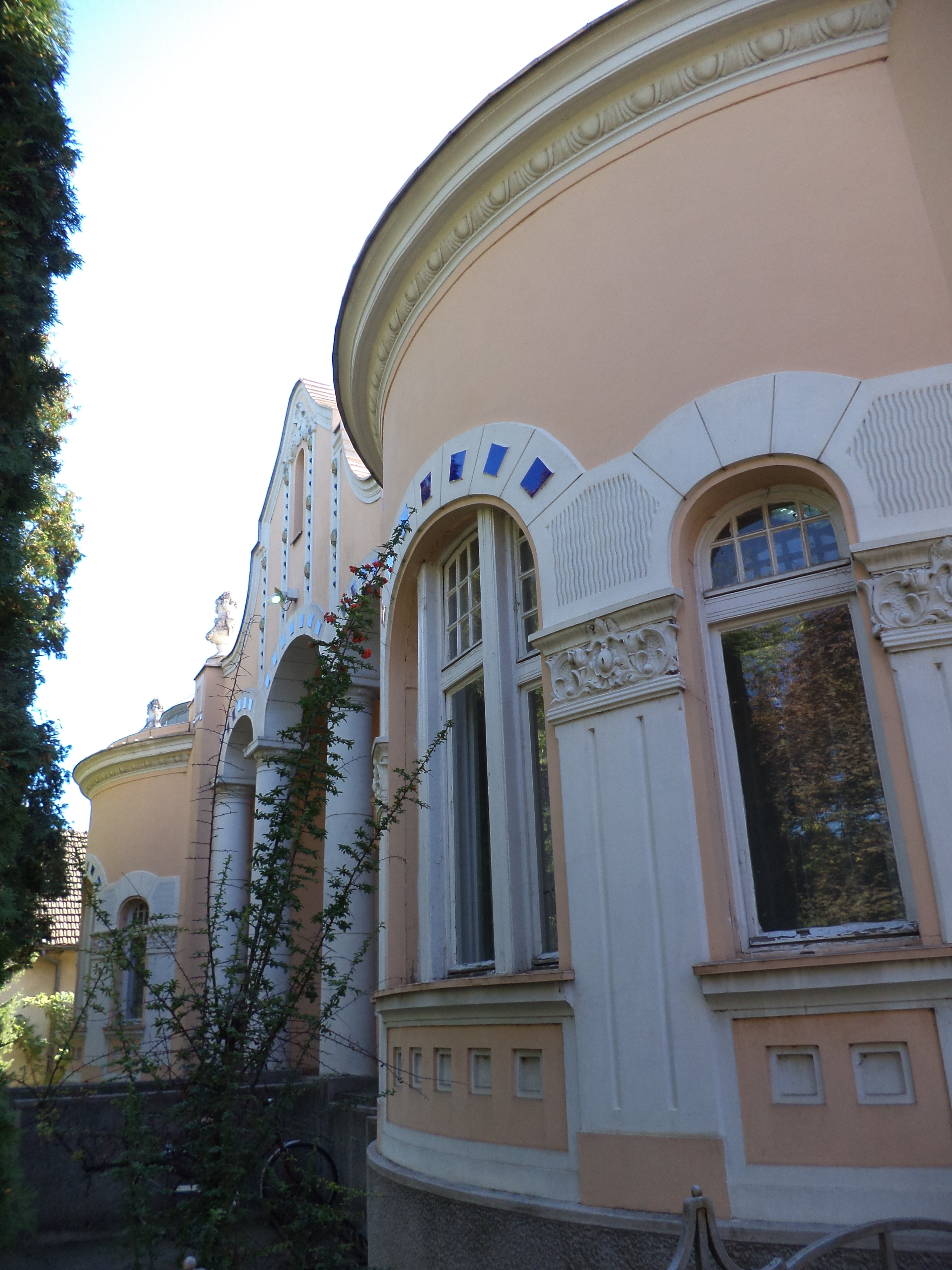 Зграда у Врбасу, улица Маршала Тита 42